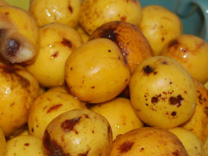 Frutos de queule (Gomortega keule), Tomé, Región del Biobío, Chile